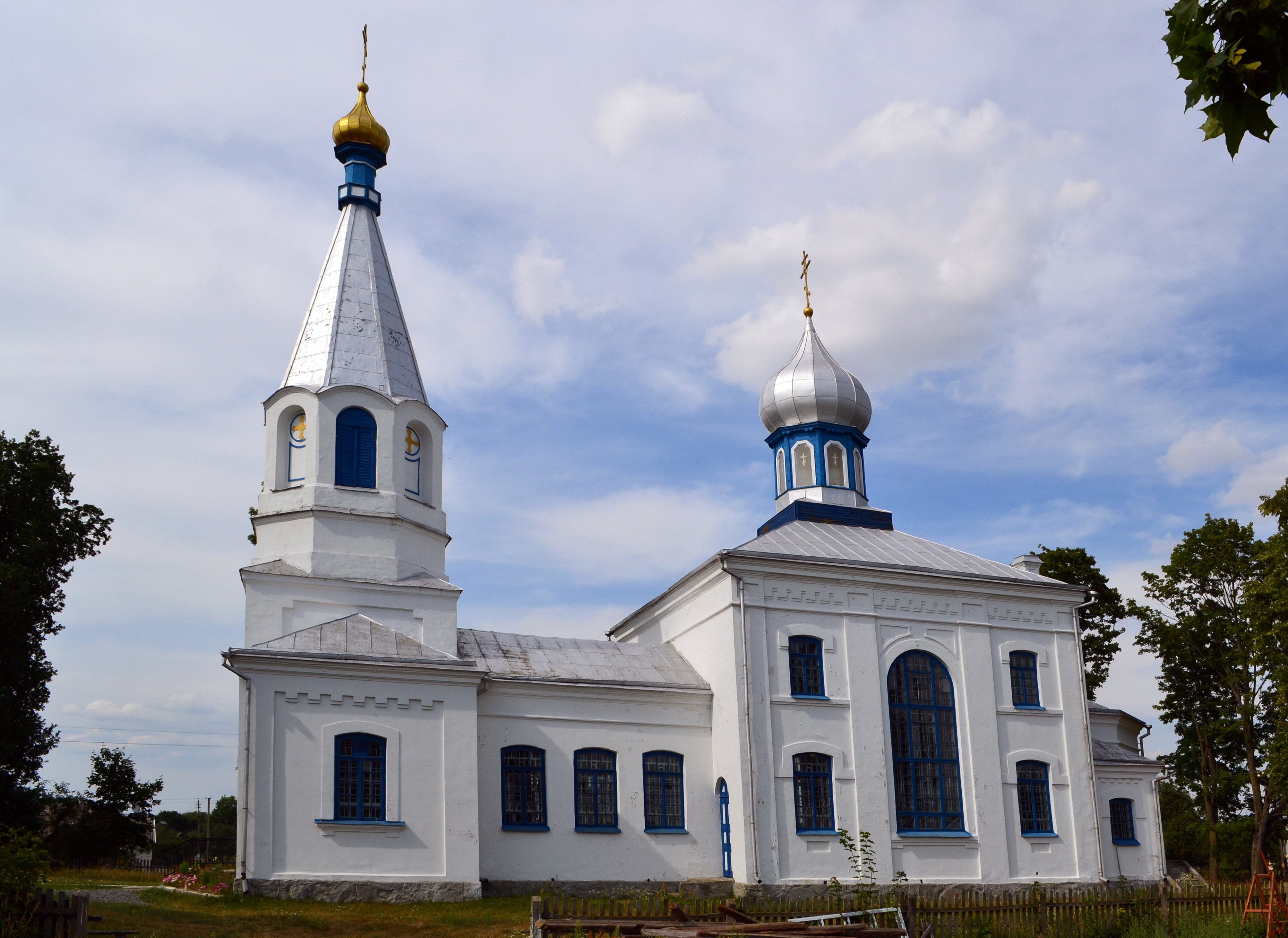 Беларуская (тарашкевіца): Крыжаўзьвіжанская царква (Аранчыцы) This is a photo of Belarusian heritage monument. Reference number: 113Г000593 ( WLM)